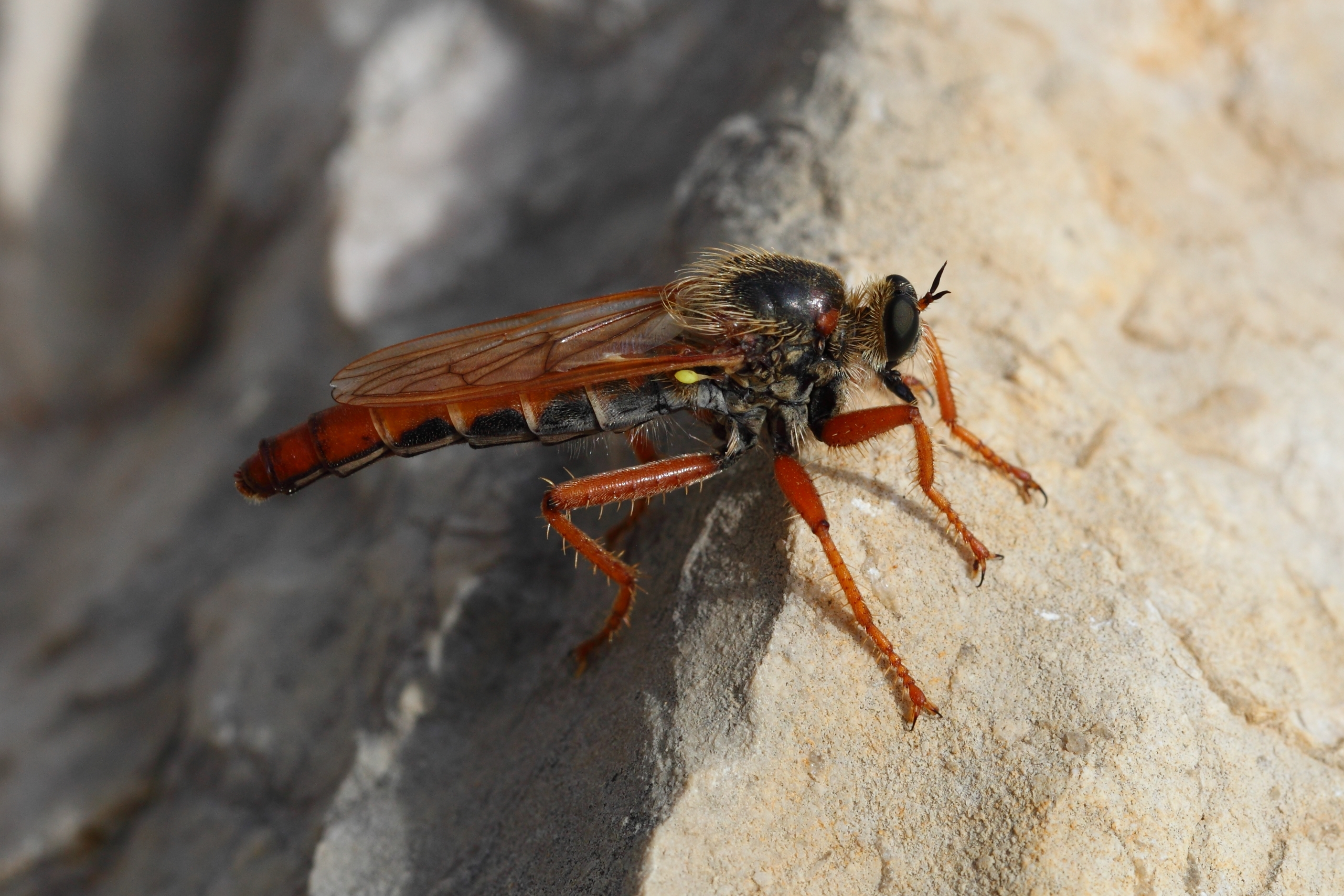 Raubfliege, Frankreich 2015